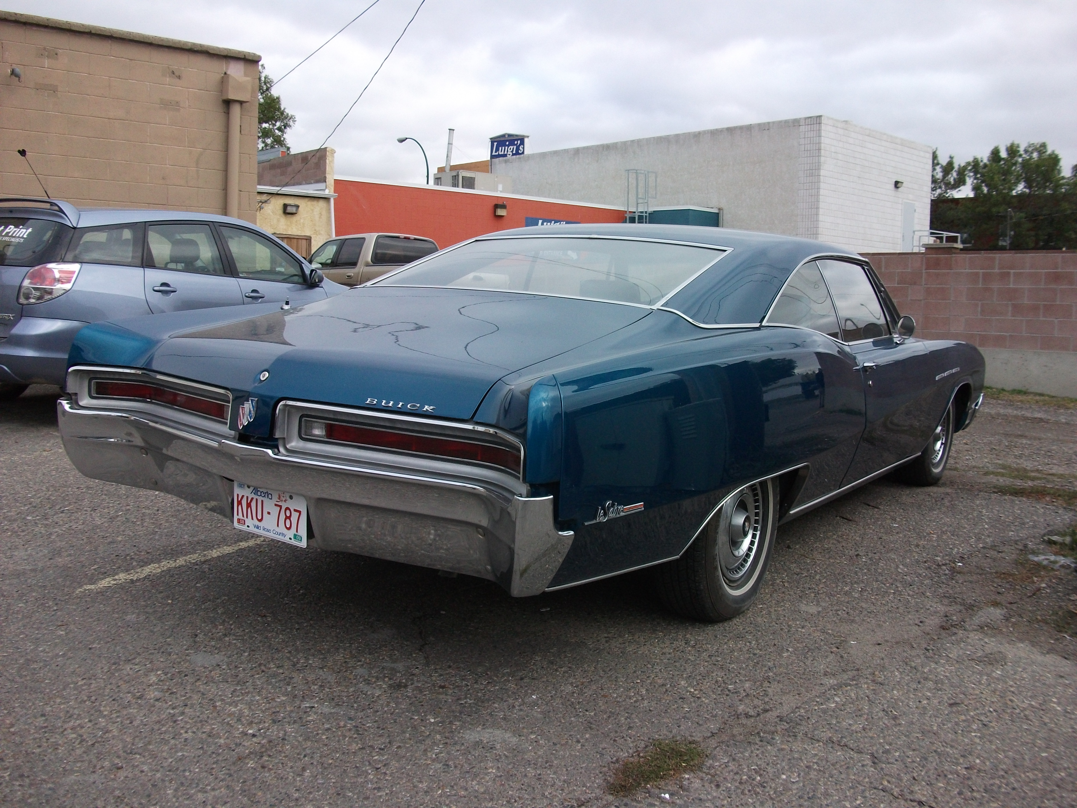 1967 Buick LeSabre